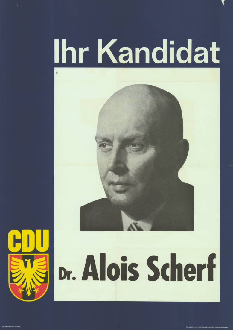 Ihr Kandidat CDU Dr. Alois Scherf Abbildung: Porträtfoto Plakatart: Kandidaten-/Personenplakat mit Porträt Auftraggeber: CDU Niedersachsen, Hannover Drucker_Druckart_Druckort: Repro-Druck, Schmiden bei Stuttgart Objekt-Signatur: 10-008 : 217 Bestand: Landtagswahlplakate Niedersachsen (10-008) GliederungBestand10-18: Landtagswahlplakate Niedersachsen (10-008) » CDU Lizenz: KAS/ACDP 10-008 : 217 CC-BY-SA 3.0 DE